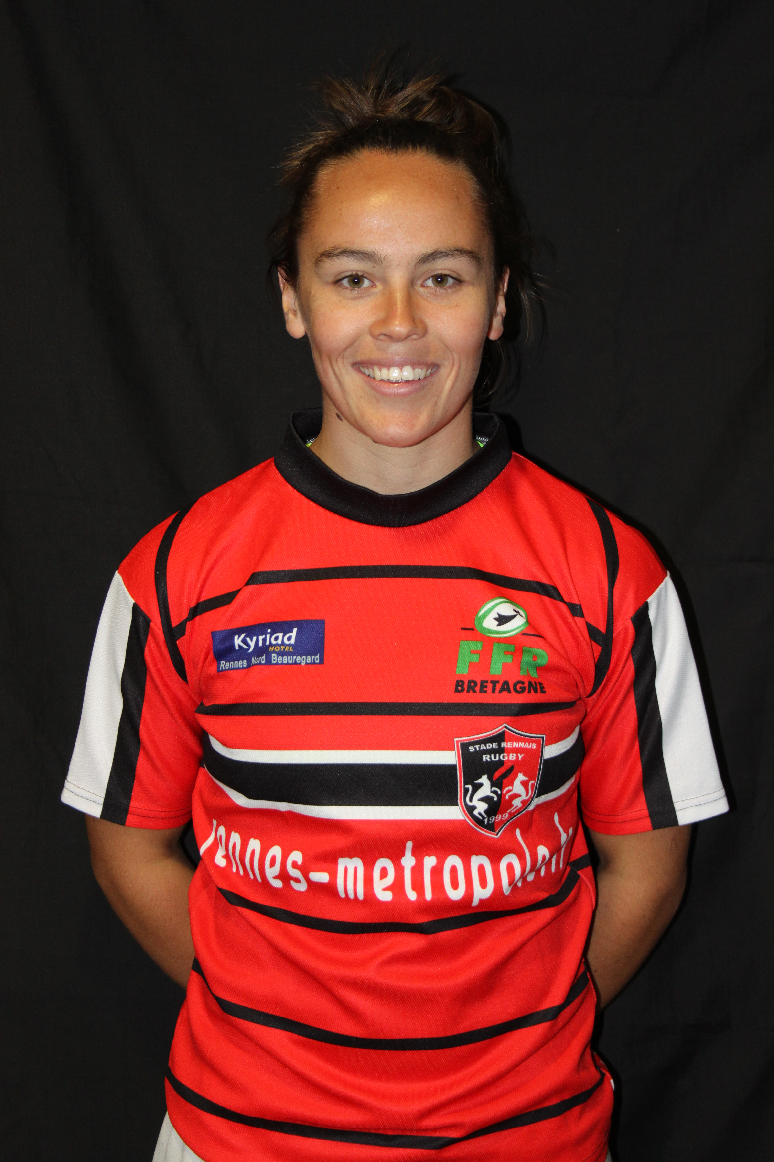 Photo de trombinoscope de Jade Le Pesq au Stade Rennais Rugby, saison 2015-2016.